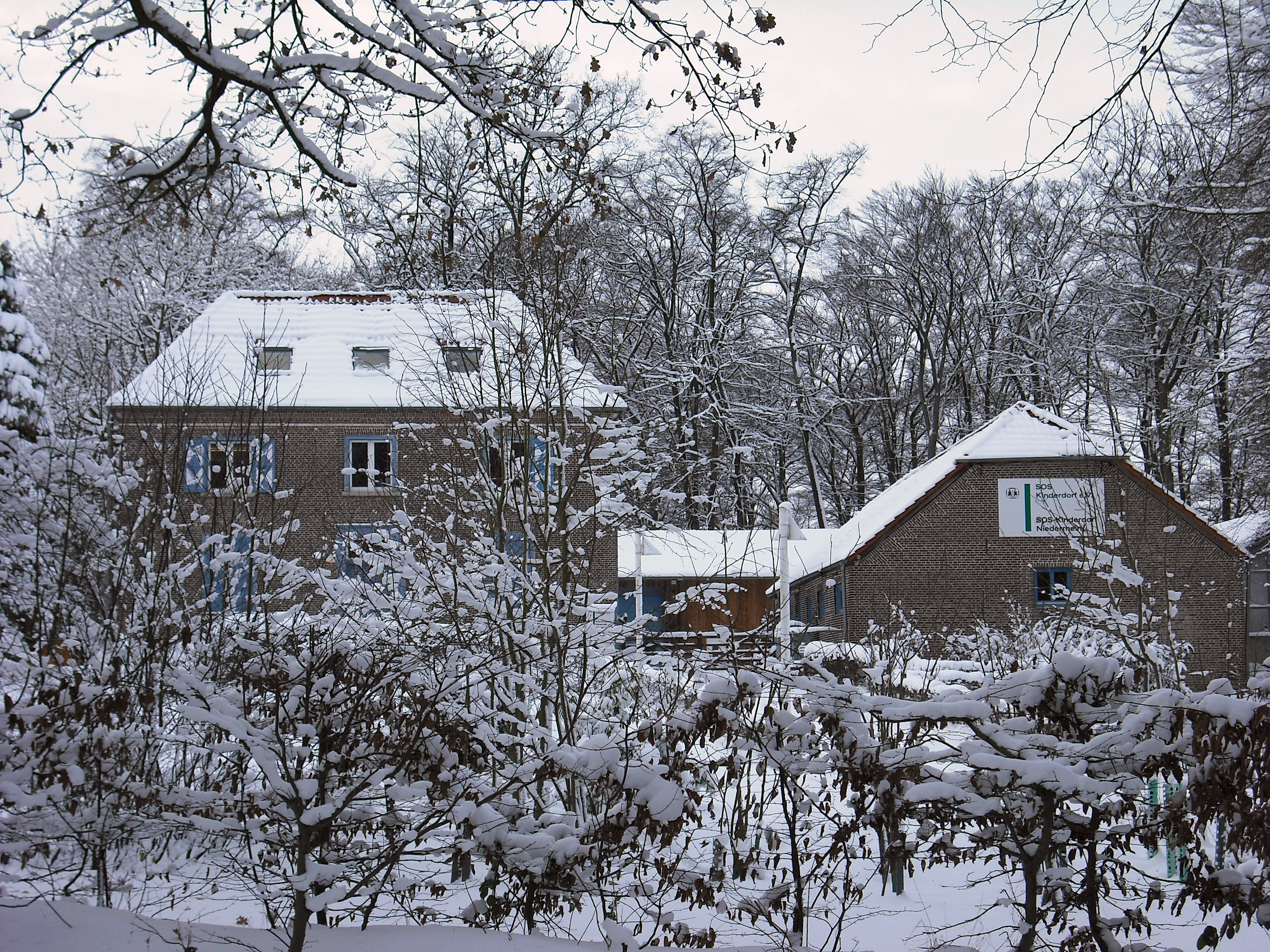 SOS Kinderdorp Niederrhein - Kleef-Donsbrüggen, Duitsland.